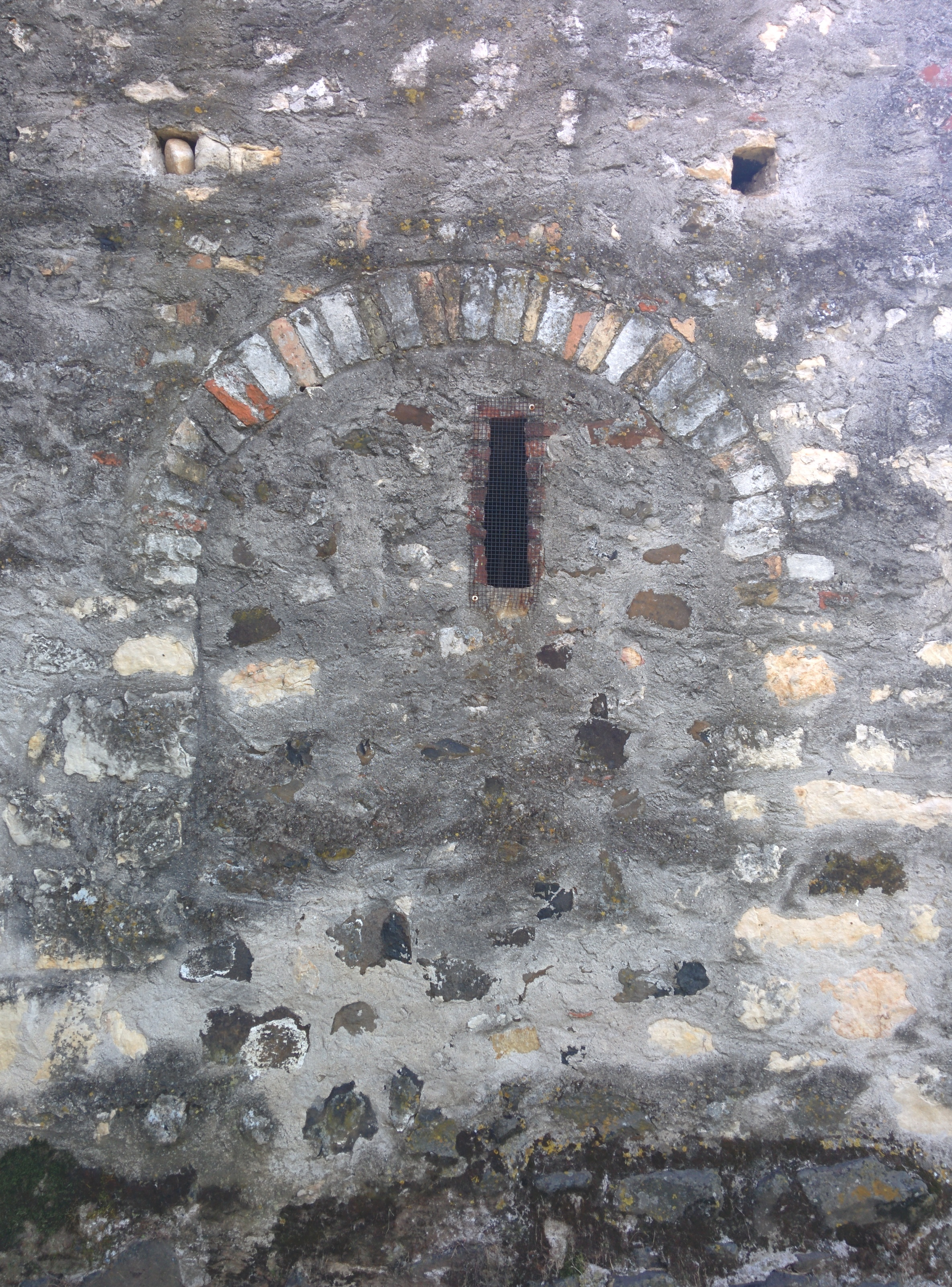 Antico arco, ora murato, che costituiva un portico passante sotto la torre campanaria della chiesa di San Lorenzo a Castelnovo di Isola Vicentina, in provincia di Vicenza.